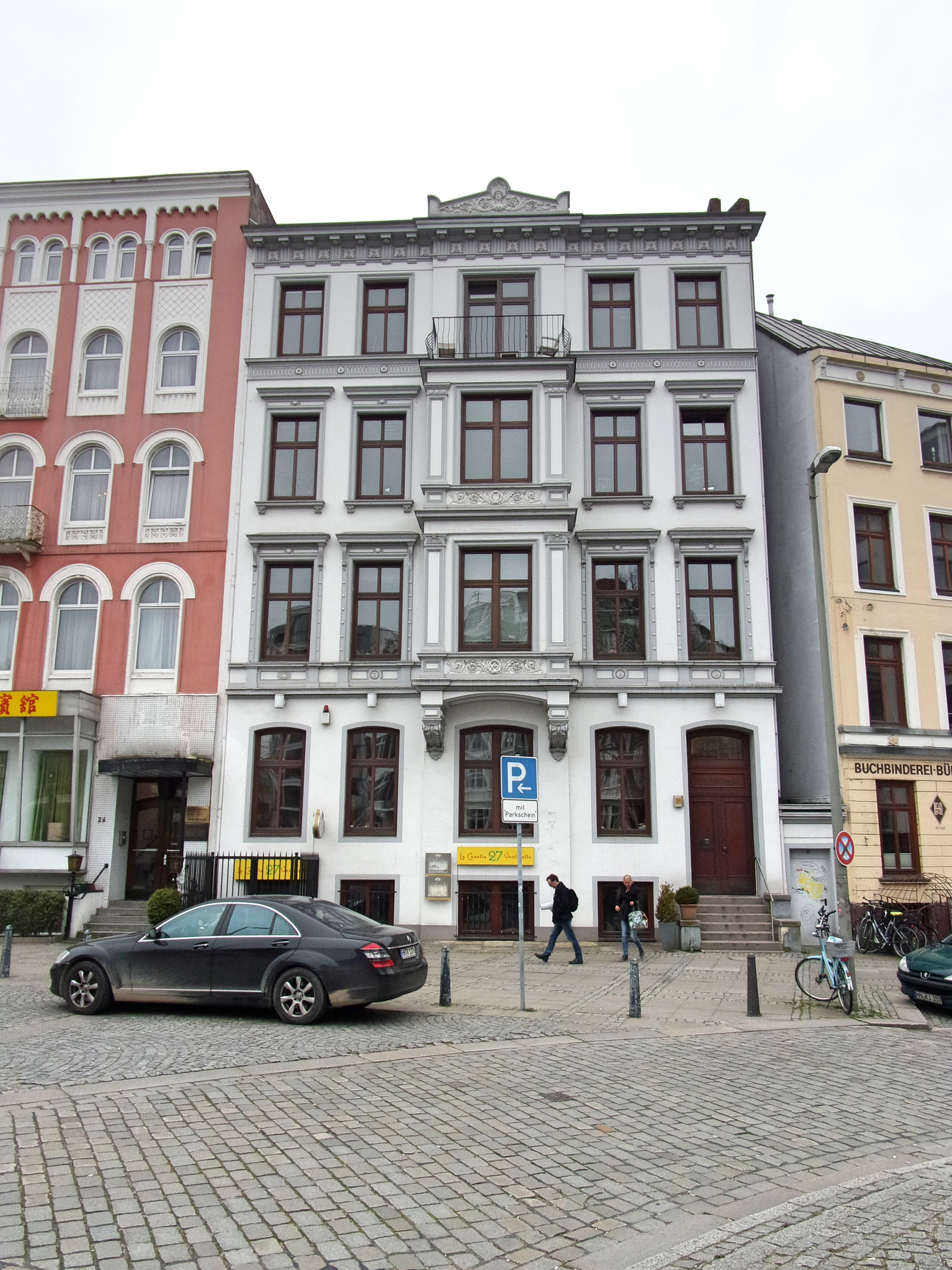 Wohnetagenhaus Kirchenallee 27, erbaut um 1868.